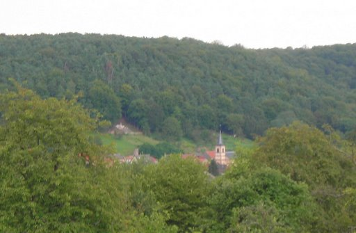 Le village de Guerting - église et monument à Sainte-Barbe - (Moselle, France), vu depuis les hauteurs